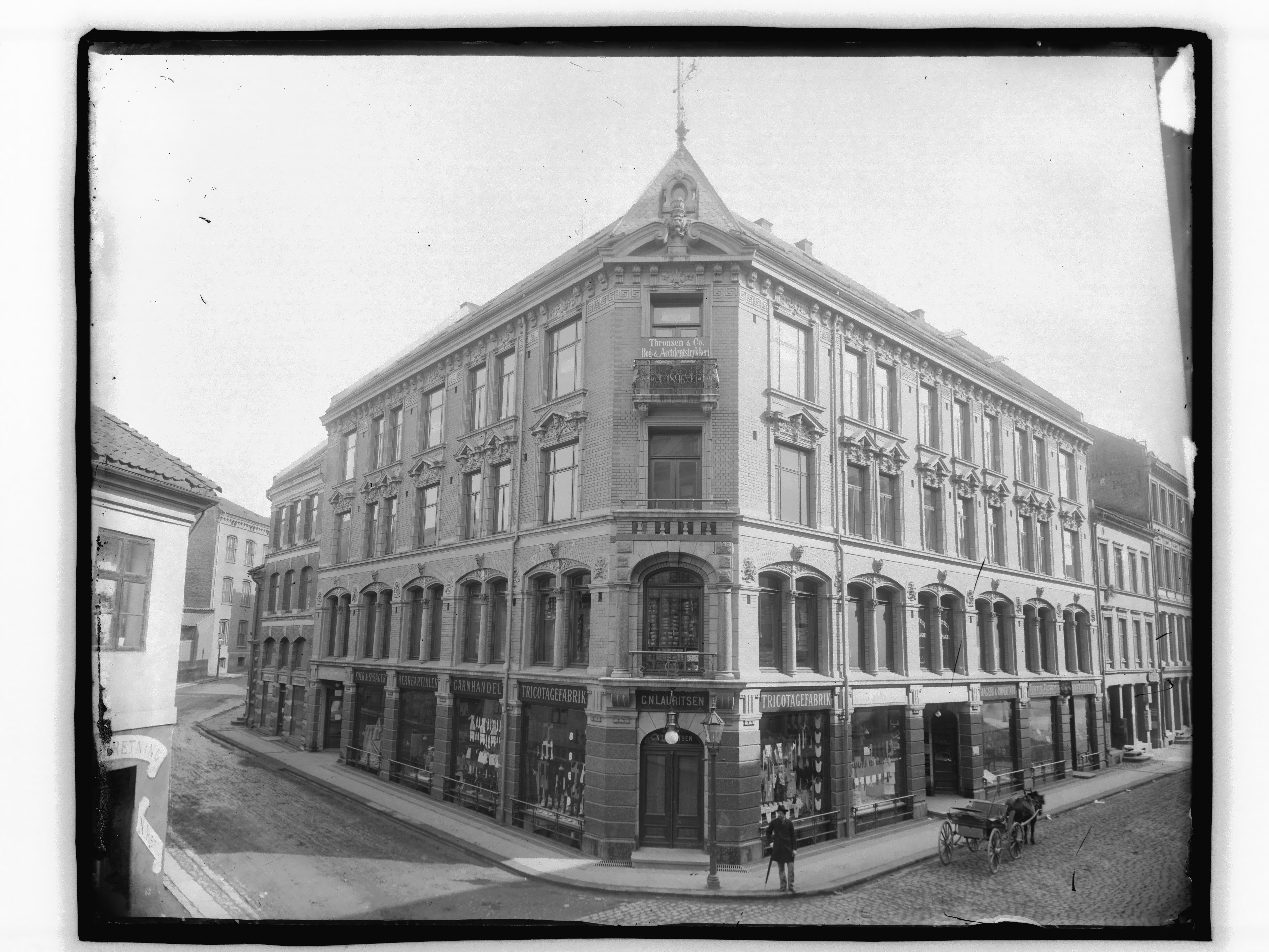 Påskrift konvolutt: Gammel bygård [Riksantikvaren] Sted: Kommune: Oslo Fylke: Oslo Tagger: C.N. Lauritsen tricotagefabrik fabrikk bygård fasade eksteriør hovedstad bydel